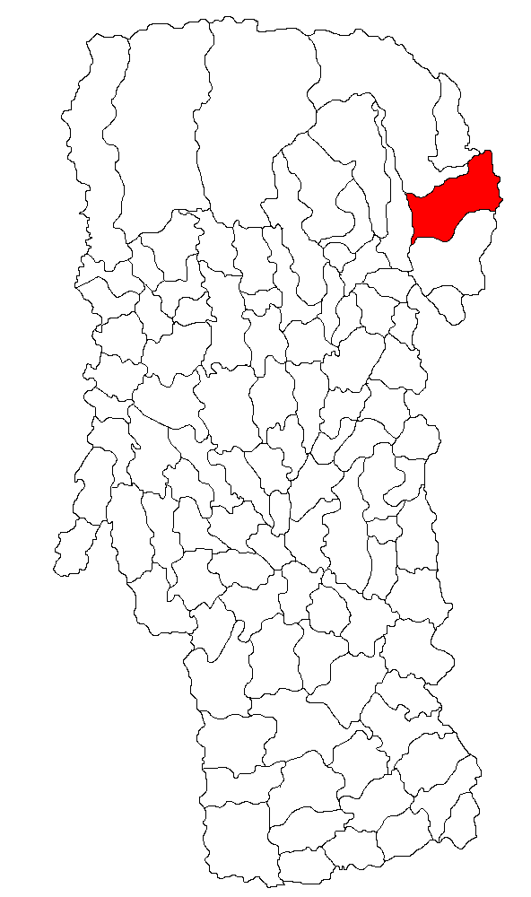 Categorie:Hărţi ale judeţului Argeş